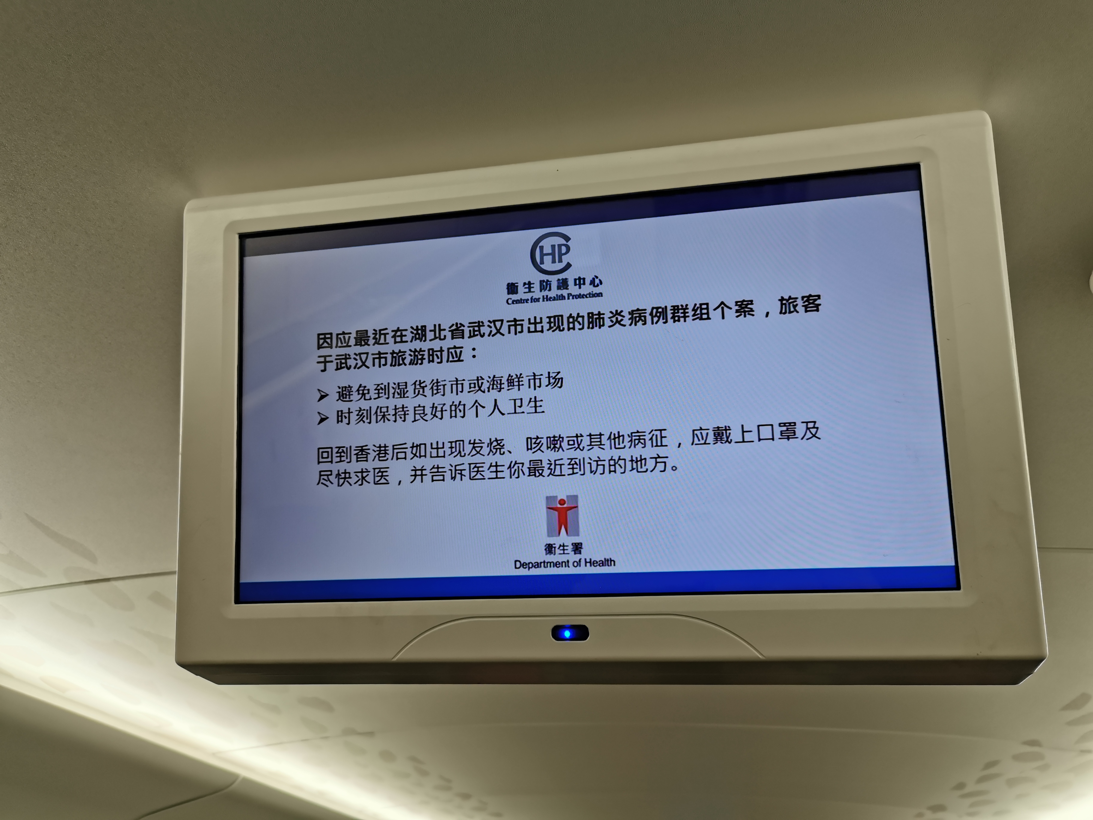 中文（中国大陆）: 因应最近在湖北省武汉市出现的肺炎病例群组个案，旅客于武汉市旅游时应： - 避免到湿货街市或海鲜卫生市场 - 时刻保持良好的个人卫生 回到香港后如出现发烧、咳嗽或其他病症，应戴上口罩及尽快就医，并告诉医生你最近到访的地方。